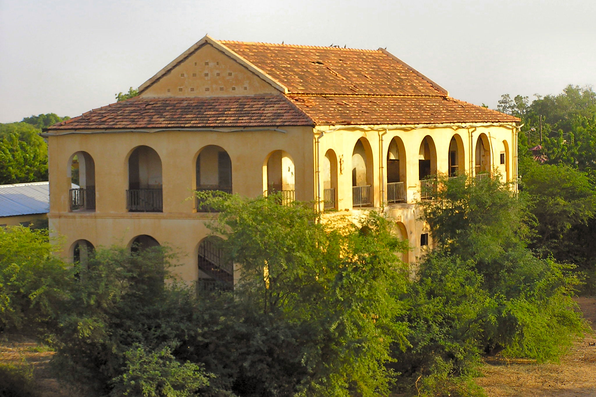 fort de Podor